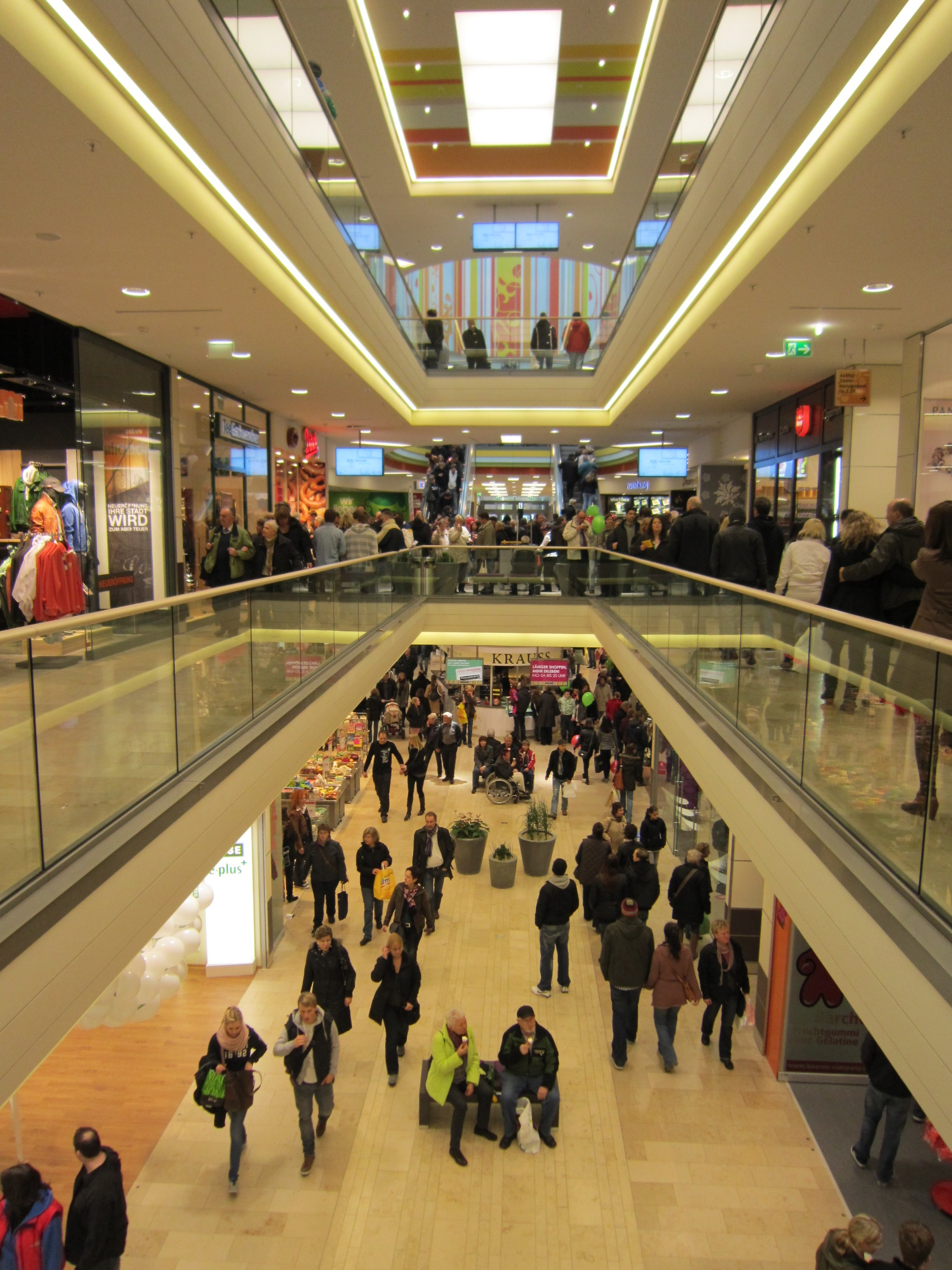 Schlosshöfe Oldenburg (Innenansicht)